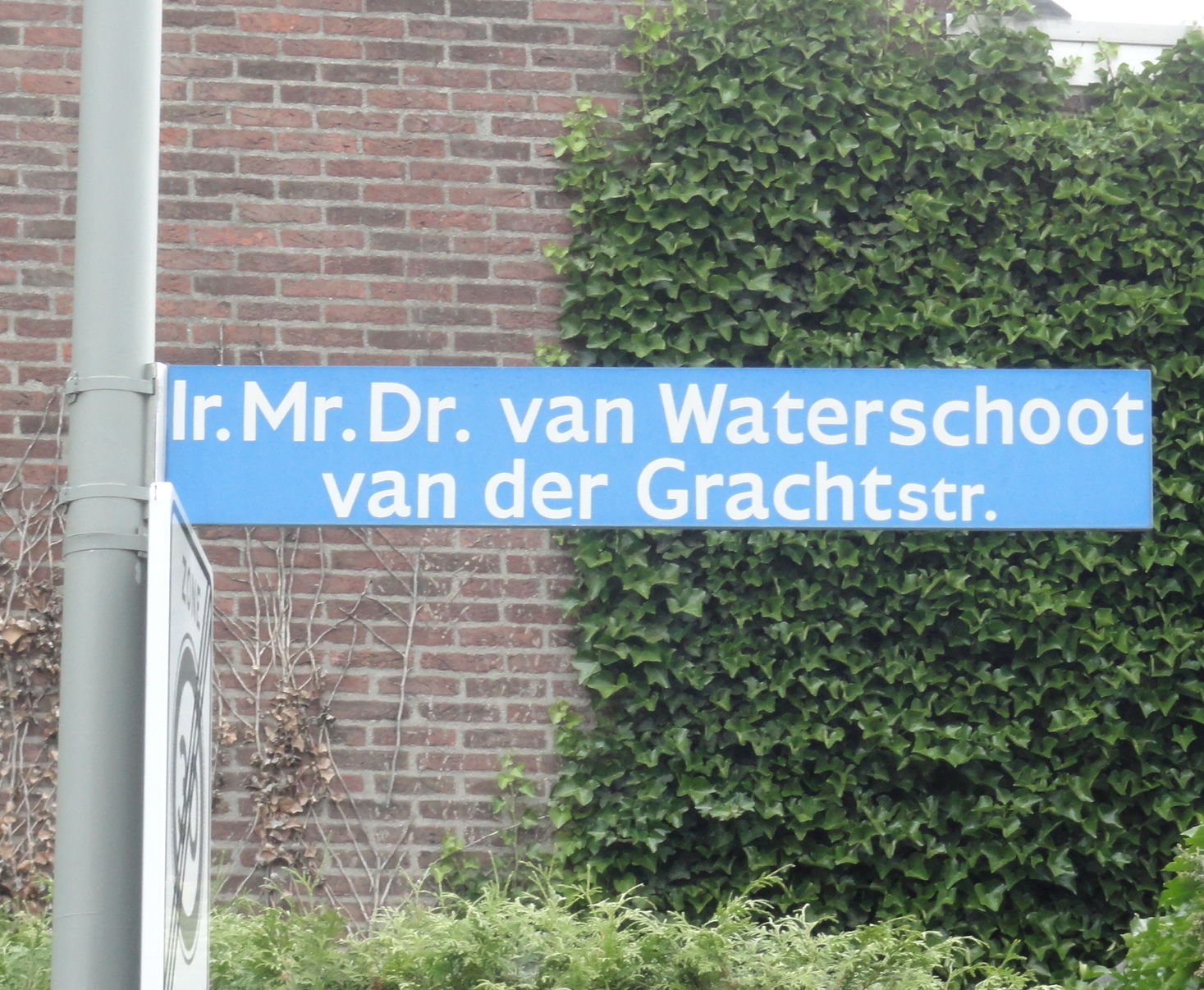 Straatnaambord van de Ir. Mr. Dr. van Waterschoot van der Grachtstraat in Heerlen, dd. 9 Juni 2020